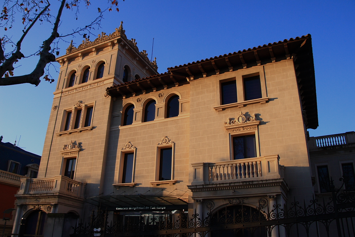 Casa Salvador ANdreu a l'Av. Tibidabo, 21 (Barcelona, Catalunya), obra de 1915-1916 d'Enric Sagnier